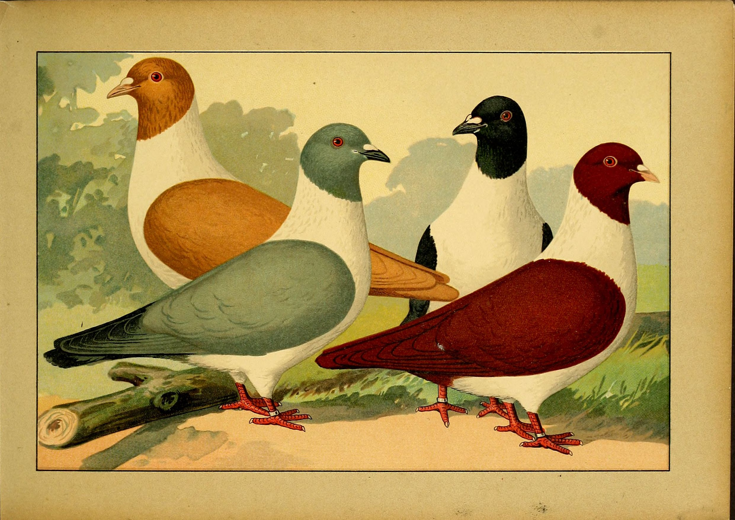 Deutsch